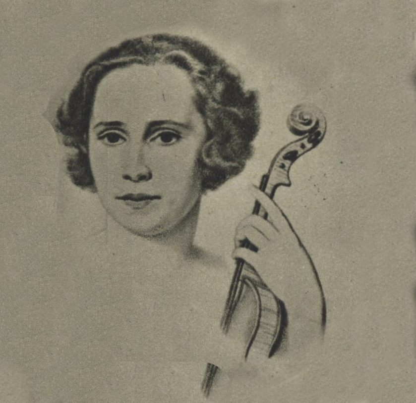 Ervína Brokešová, houslistka, 1900-1987